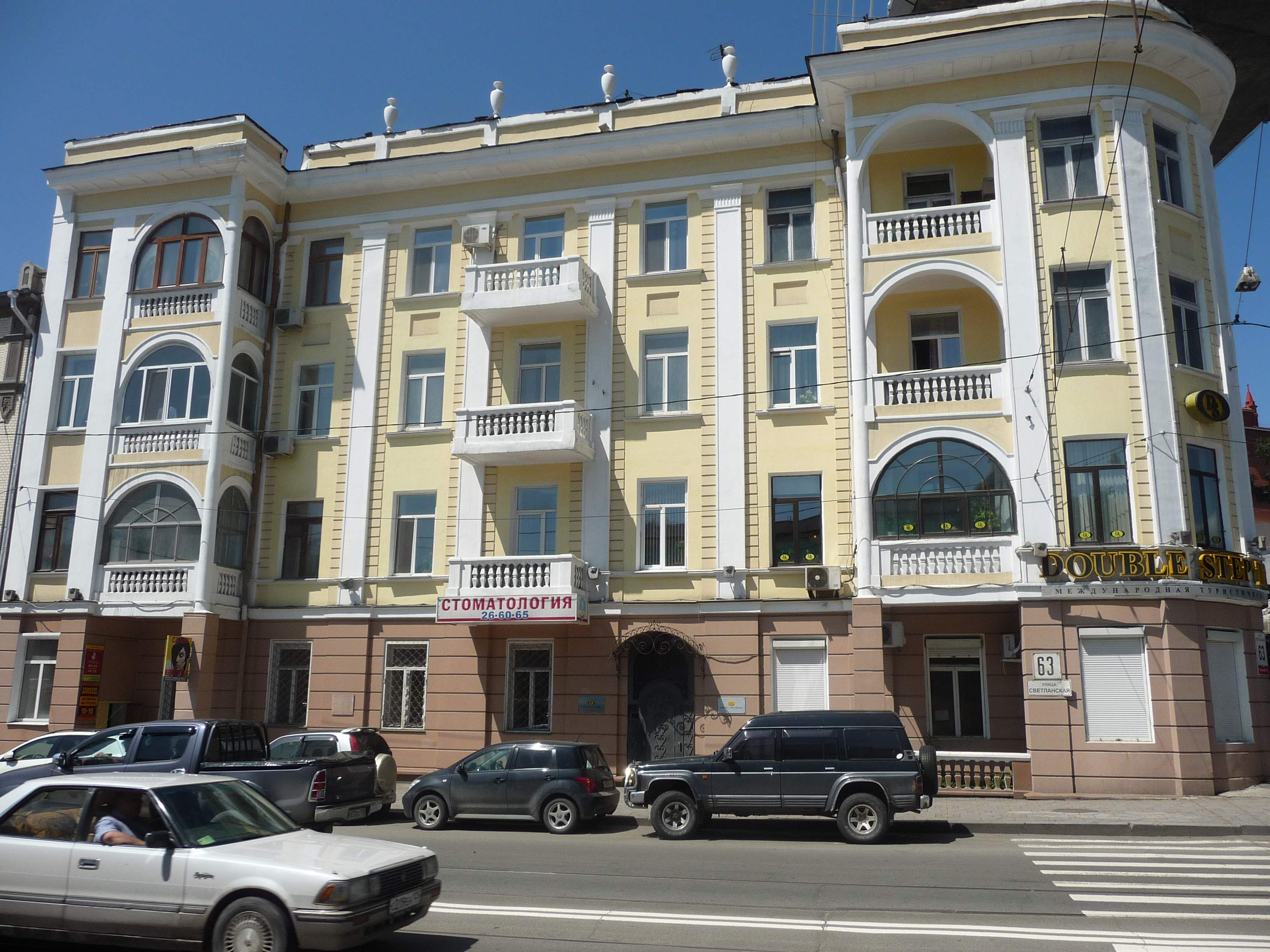 Владивосток, ул. Светланская, 63, 2012-07-05